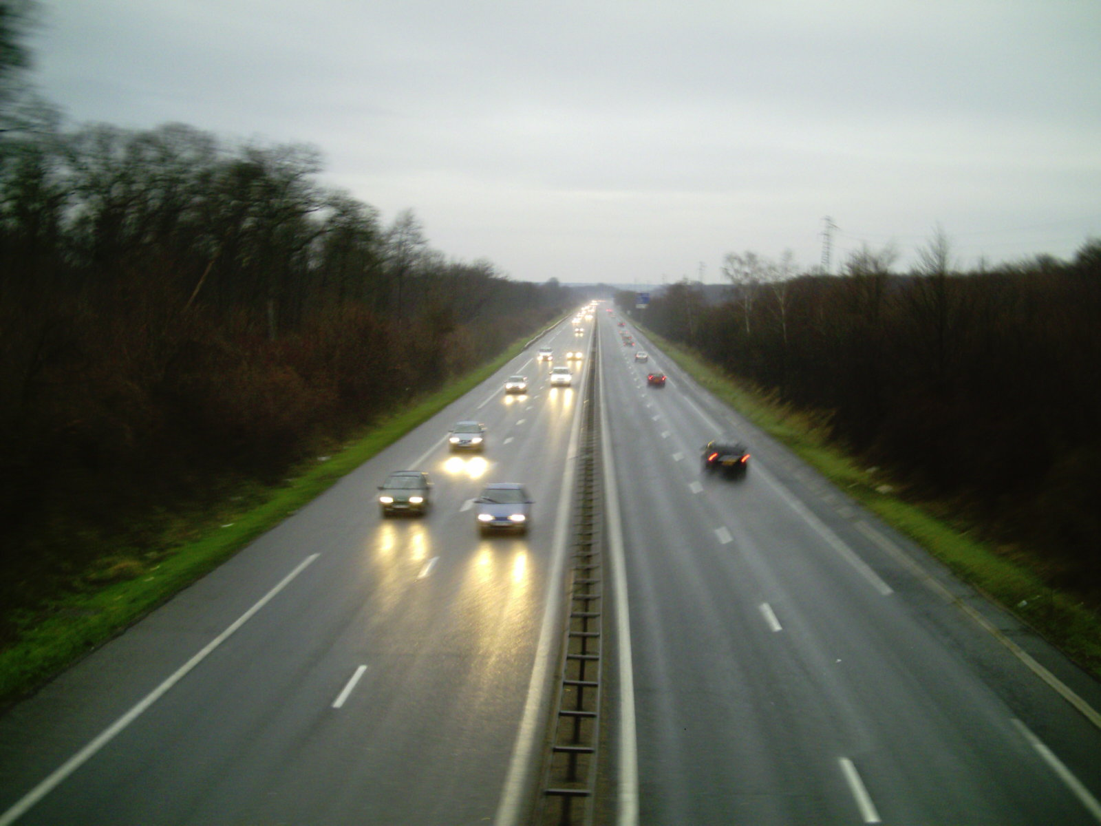 A33 depuis la passerelle de la petite Haye, 500m après l'aire de repos du bois Julien (commune de Laxou)